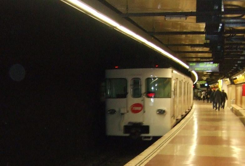 Tren de la serie 1100 del Metro de Barcelona, en Verdaguer (L4).